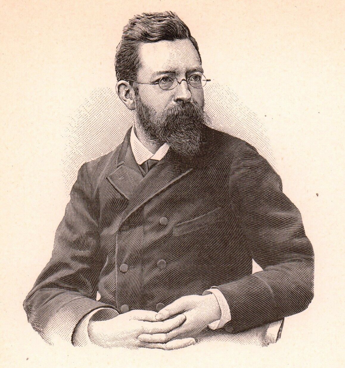 French historian and poet Pierre de Nolhac (1859-1936)